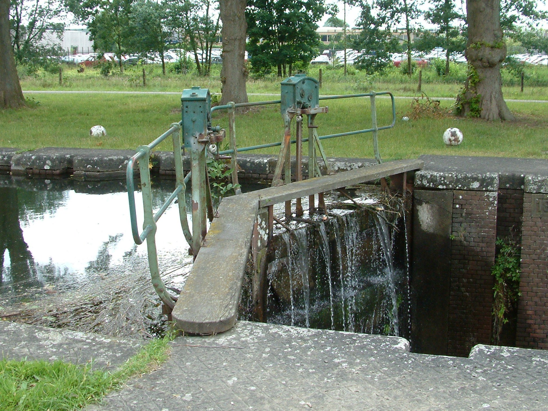 Sluis in het Apeldoorns kanaal van Dieren naar Hattem